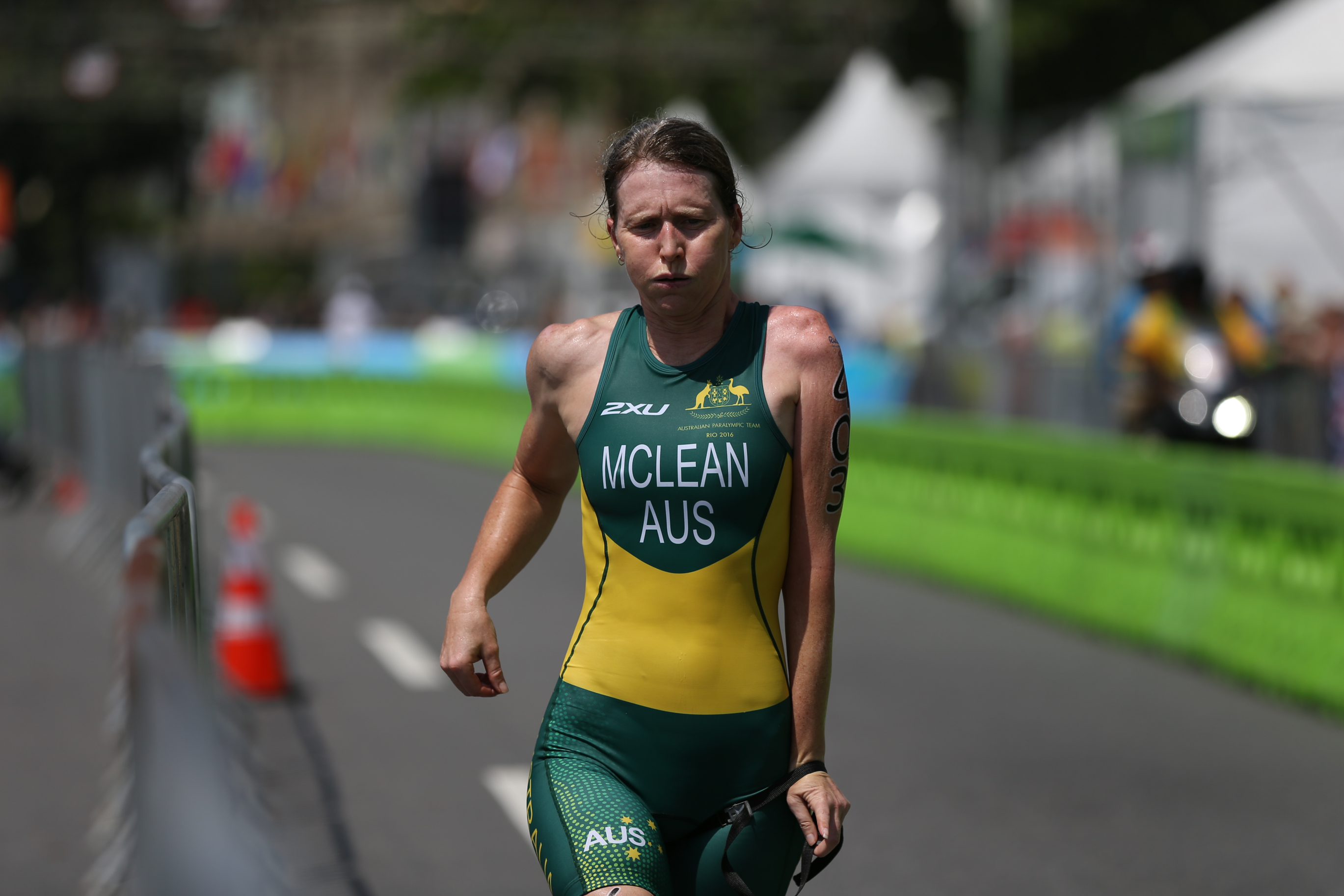 Rio de Janeiro - Provas de triatlo feminino PT4, PT2 e PT5, em Copacabana. Competição da categoria PT5. (Tânia Rêgo/Agência Brasil)